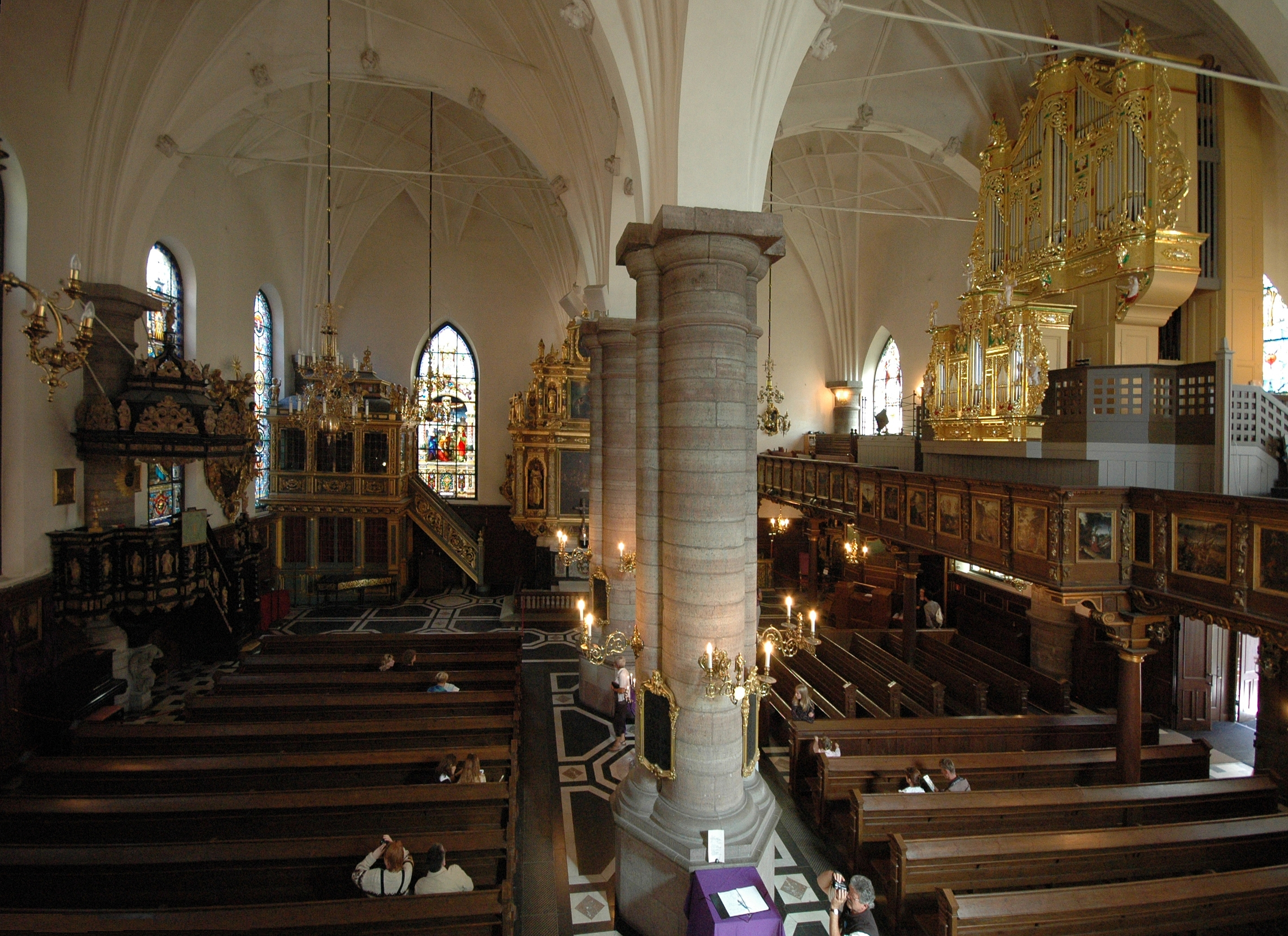 Deutsche Kirche Stockholm